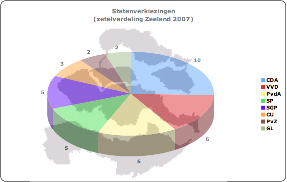 Uitslag provinciale statenverkiezingen Zeeland vertaald in zetels